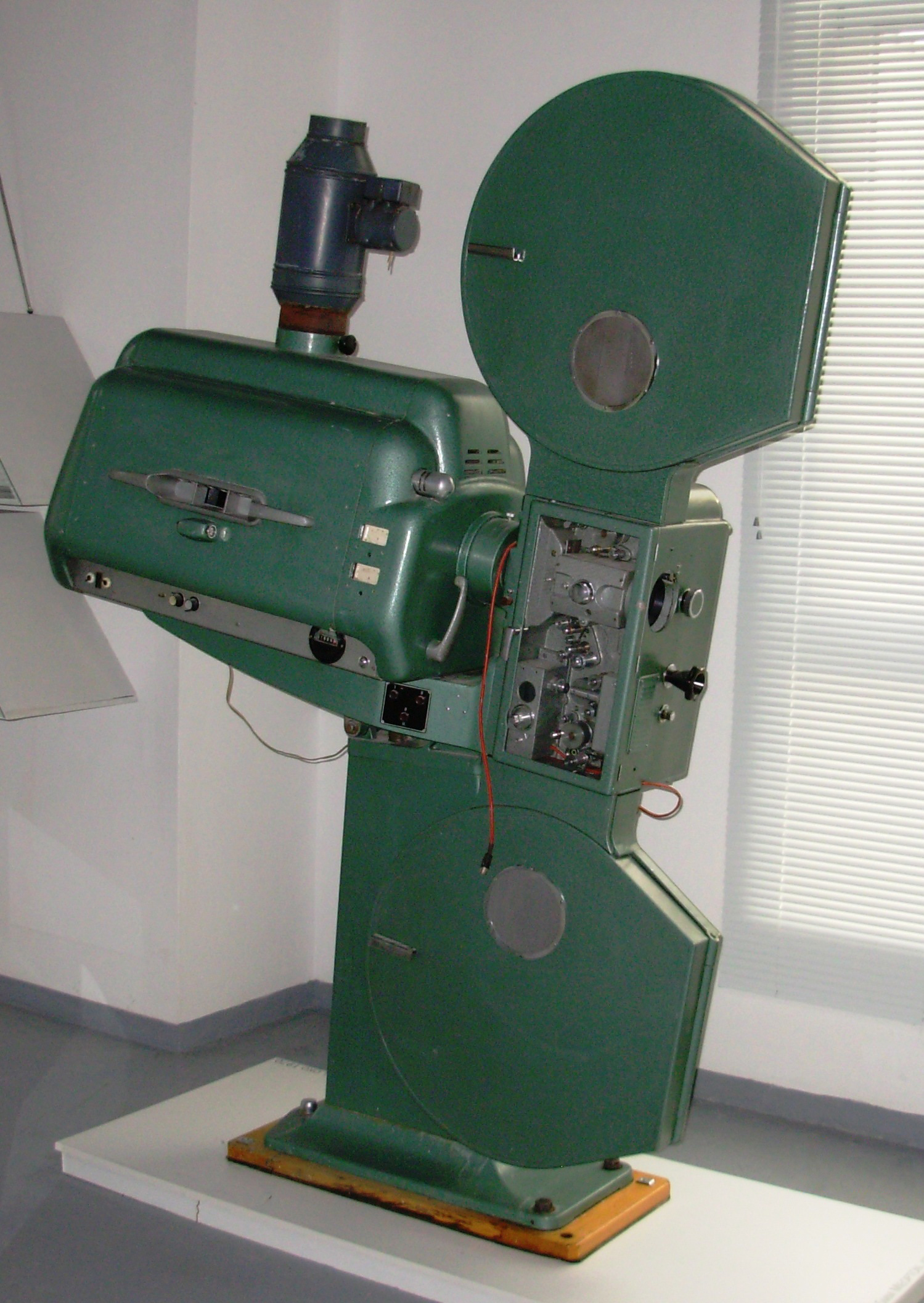 Kino projektor Meopton III (Meopta Přerov, Čehoslovačka) tj. uređaj za projektovanje dugometražnih i ostalih filmova u bioskopskim dvoranama. Muzej nauke i tehnike, Beograd. Slikao Goldfinger